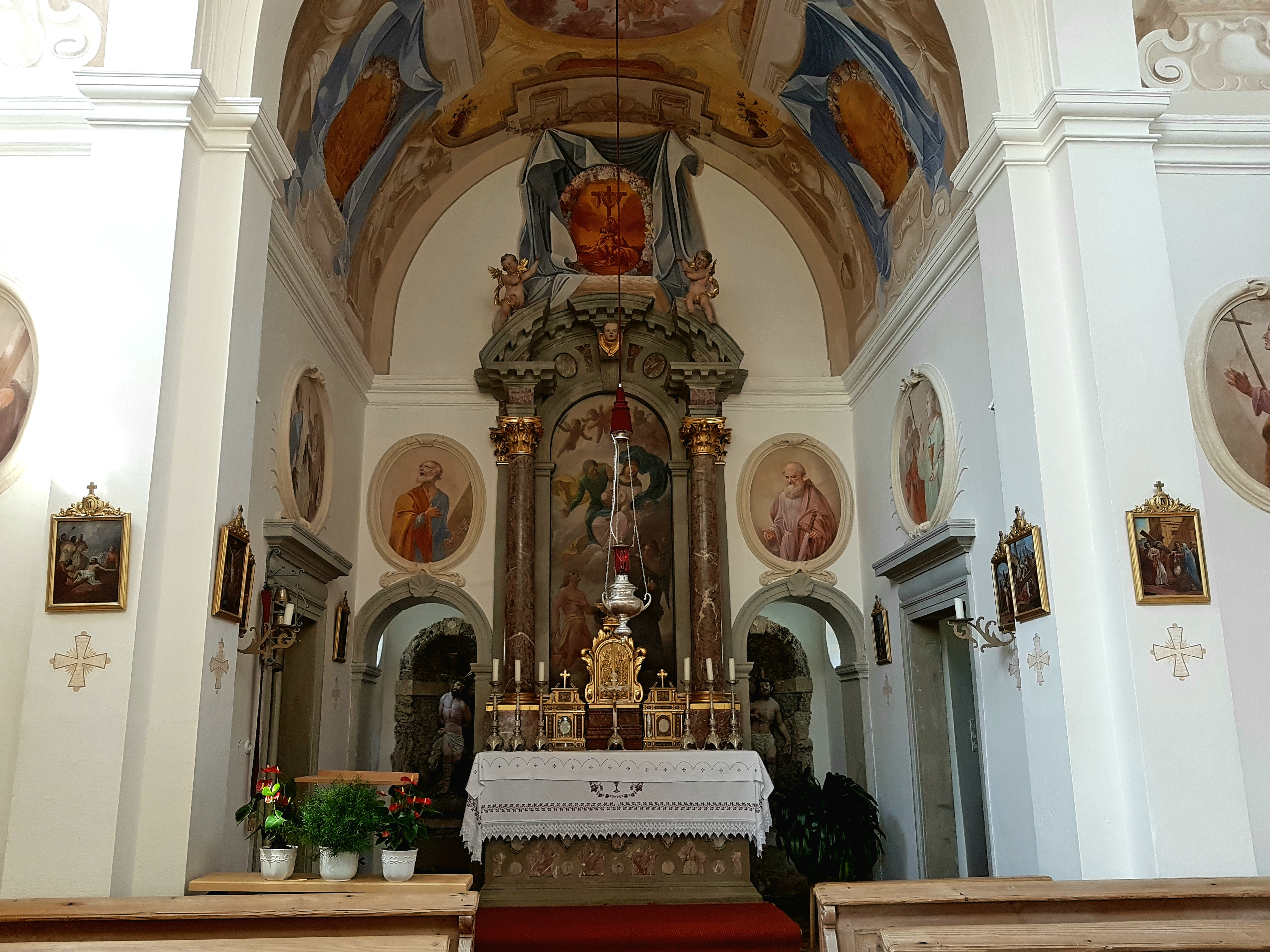 Kapelle Mariä Sieben Schmerzen (Sameister)